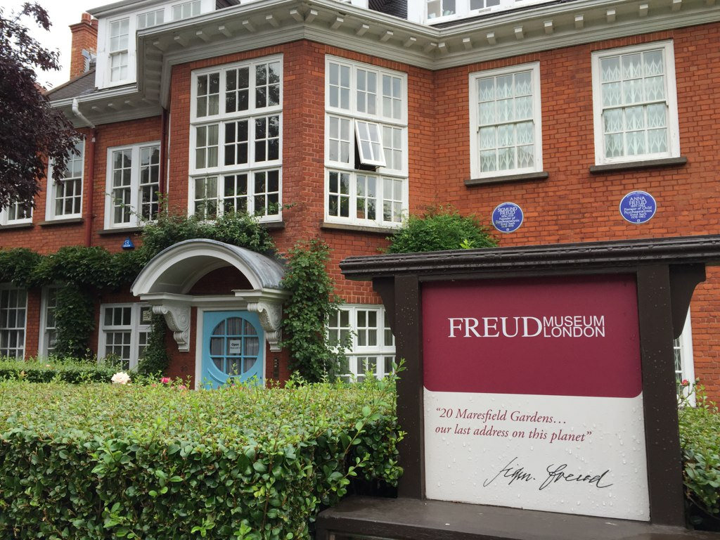 Freud Museum